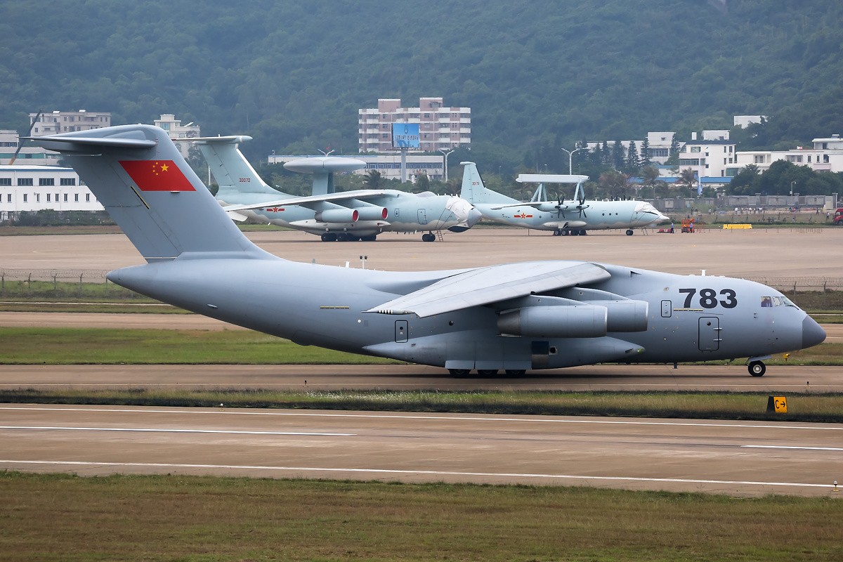 783 (cn 0003)